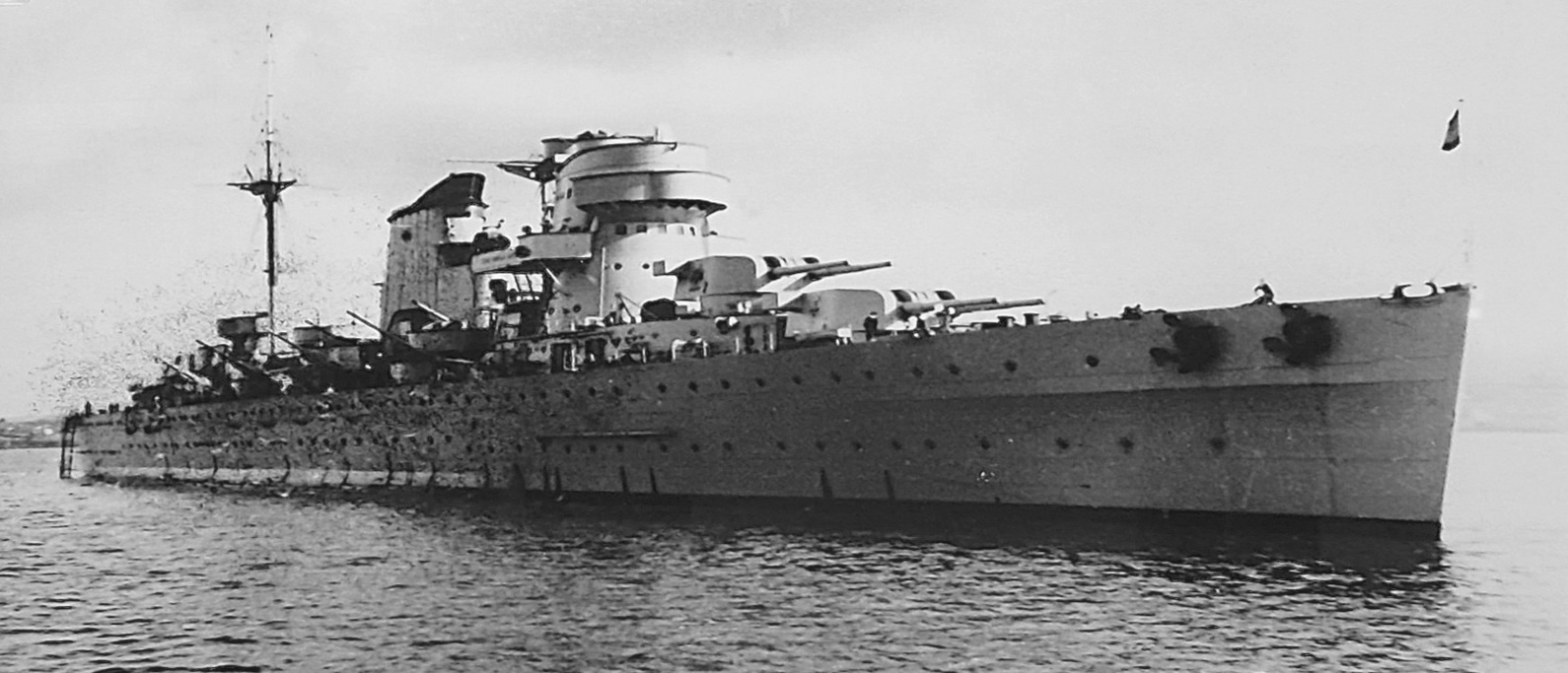 Fotografía del Crucero Baleares cedida al Museo Naval de Ferrol por el comandante de la fragata del mismo nombre.